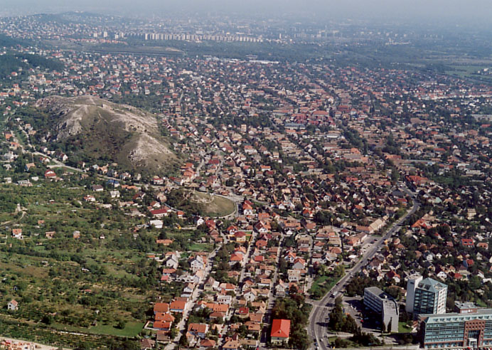 Budaörs- Hungary - Europe